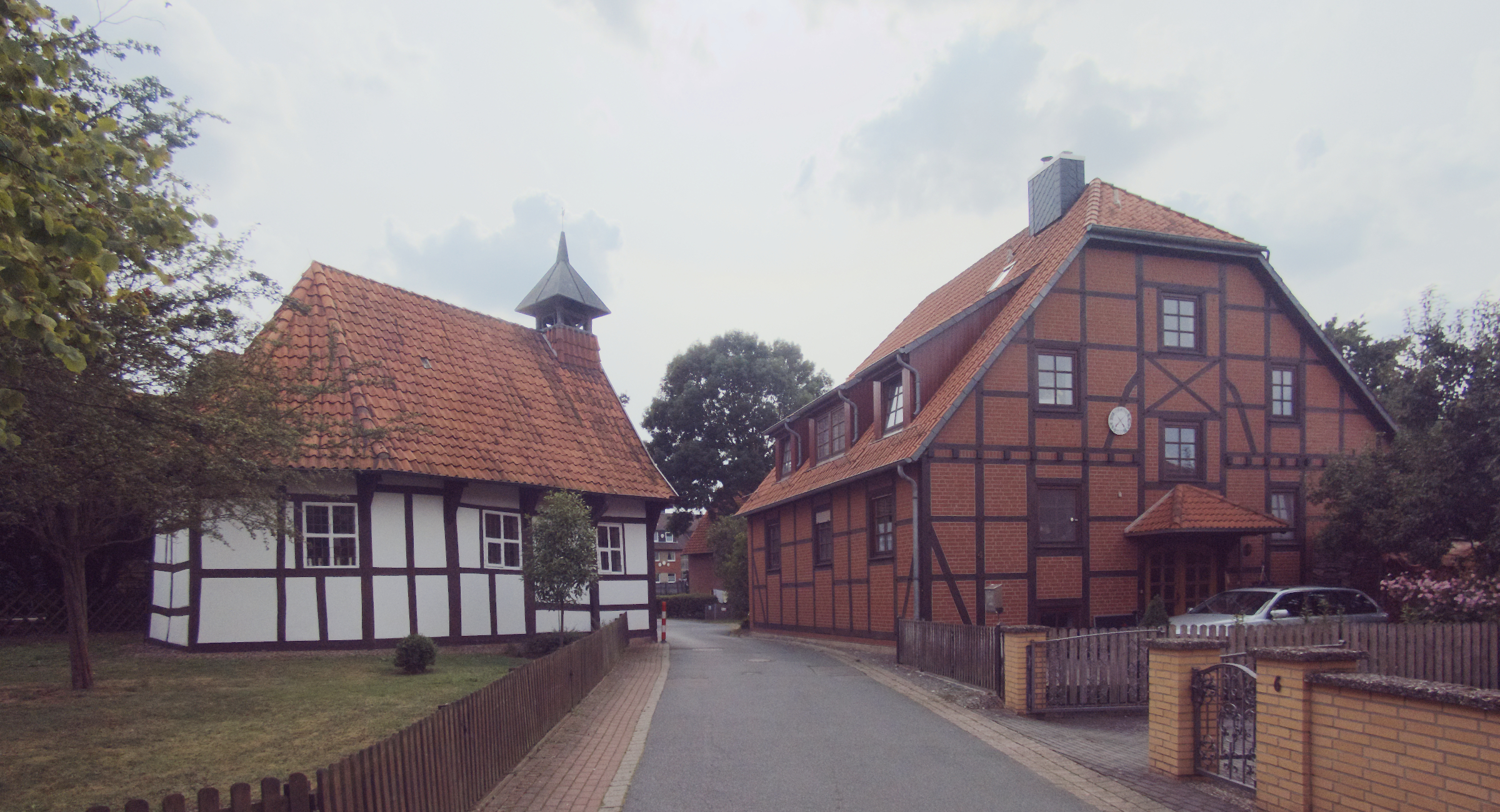 Die "Kapelle Northen" ist eine denkmalgeschützte Fachwerkkapelle in Northen, einem Stadtteil von Gehrden in der Region Hannover in Niedersachsen.